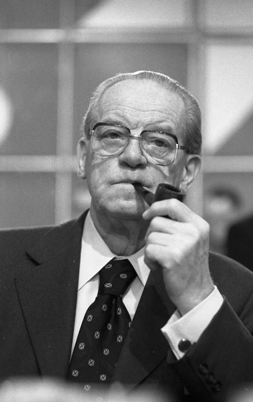 Außerordentlicher Parteitag der SPD im Messe-Kongreß-Zentrum in Köln zur Vorbereitung für die Europa-Parlament-Wahl 1979